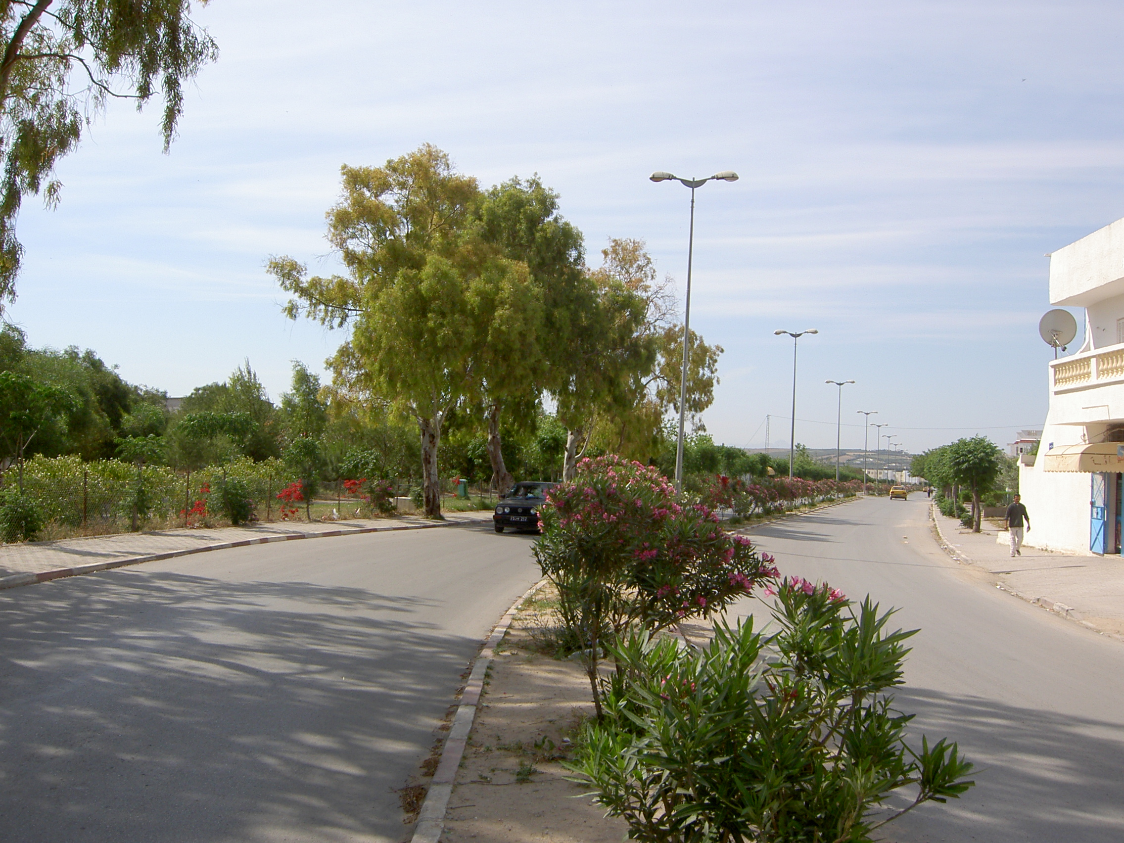 Oued Ellil, Tunisia